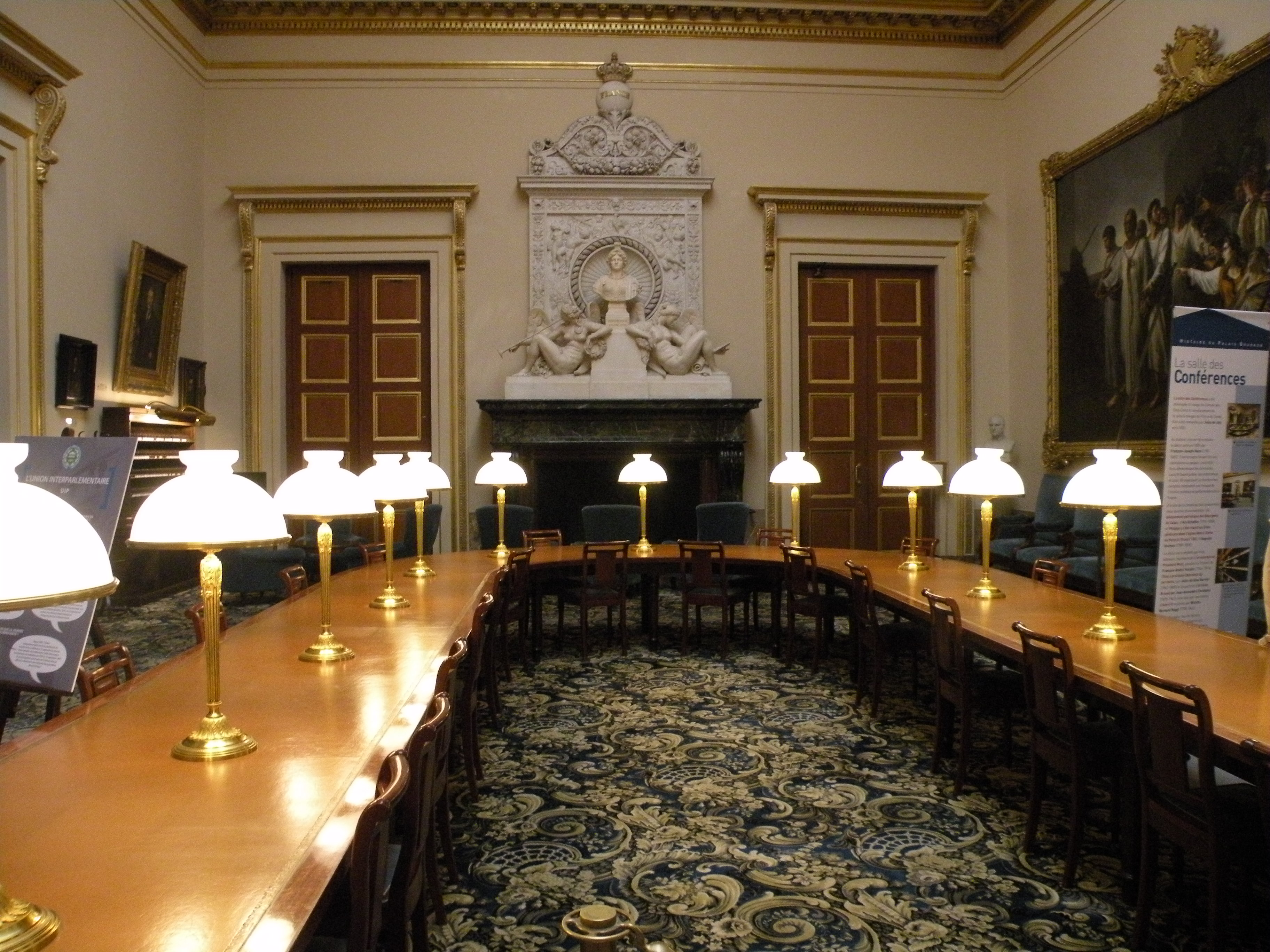 salle des conférences